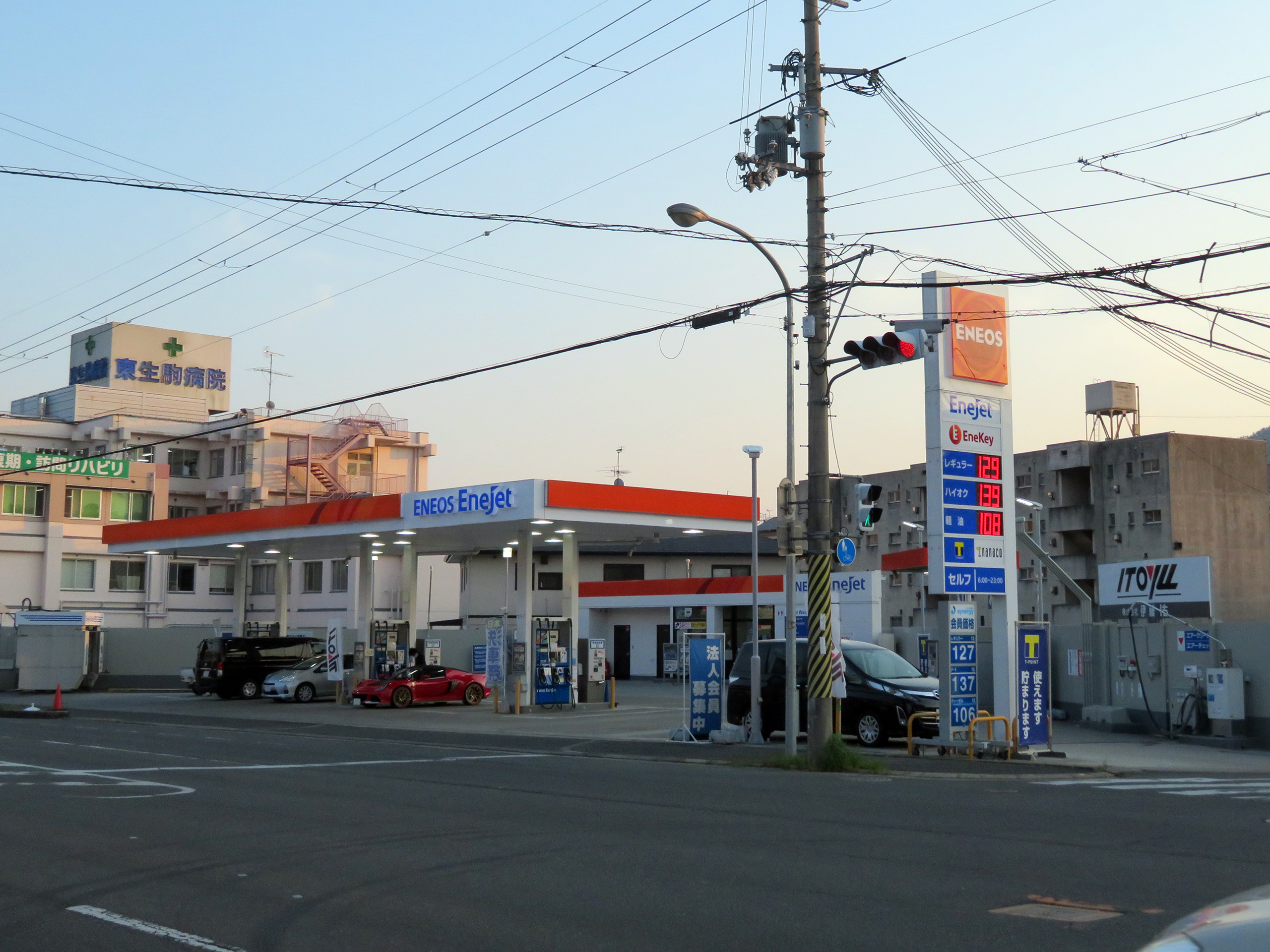 エネオスエネジェット東生駒SSを撮影。